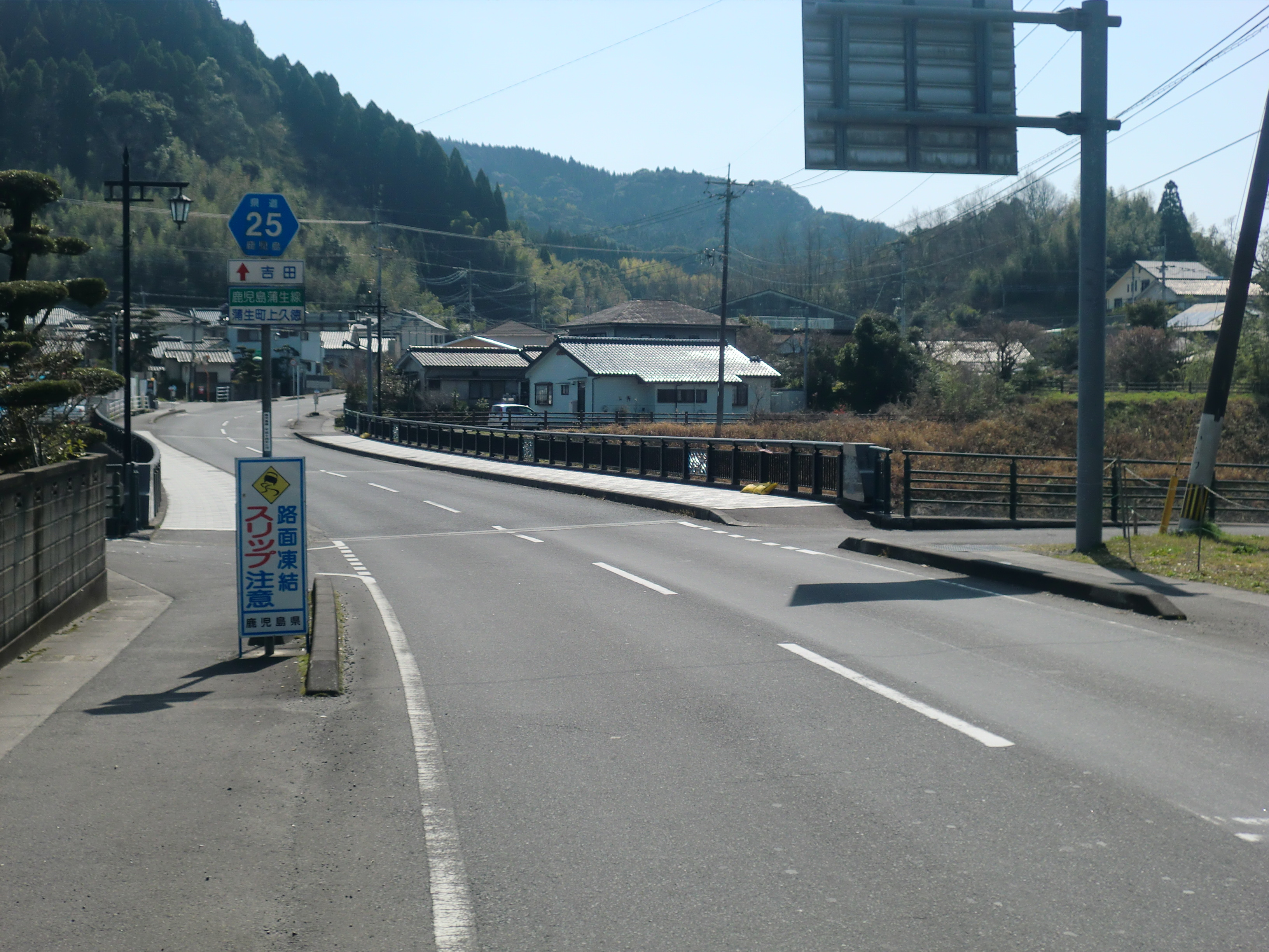 鹿児島県道25号鹿児島蒲生線。姶良市で撮影。